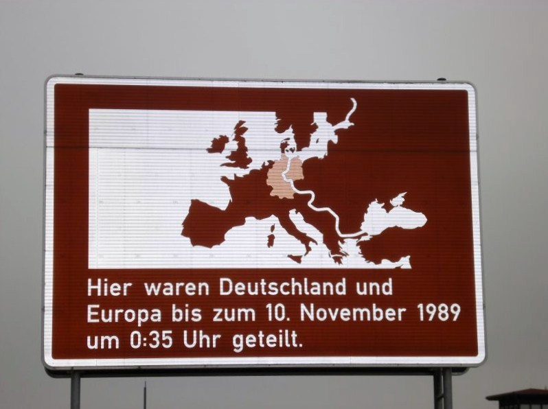 Grenzlandmuseum Eichsfeld, Erinnerung an den Verlauf der Grenze und die Grenzöffnung zwischen Gerblingerode und Duderstadt